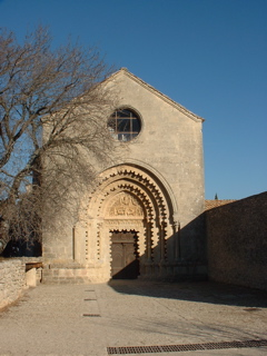 Ganagobie (Alpes-de-Haute-Provence, France) L'église Notre-Dame (XIIe siècle) du prieuré de Ganagobie. Portail roman surmonté d'un oculus Description de l'image : photo personnelle pour illuster l'article sur Monastère_de_Ganagobie Source : Appareil photo numérique (Fuji FinePix 2400z) Statut : Image sans copyright je Utilisateur:Jeff1er estime que cette image est libre de droit